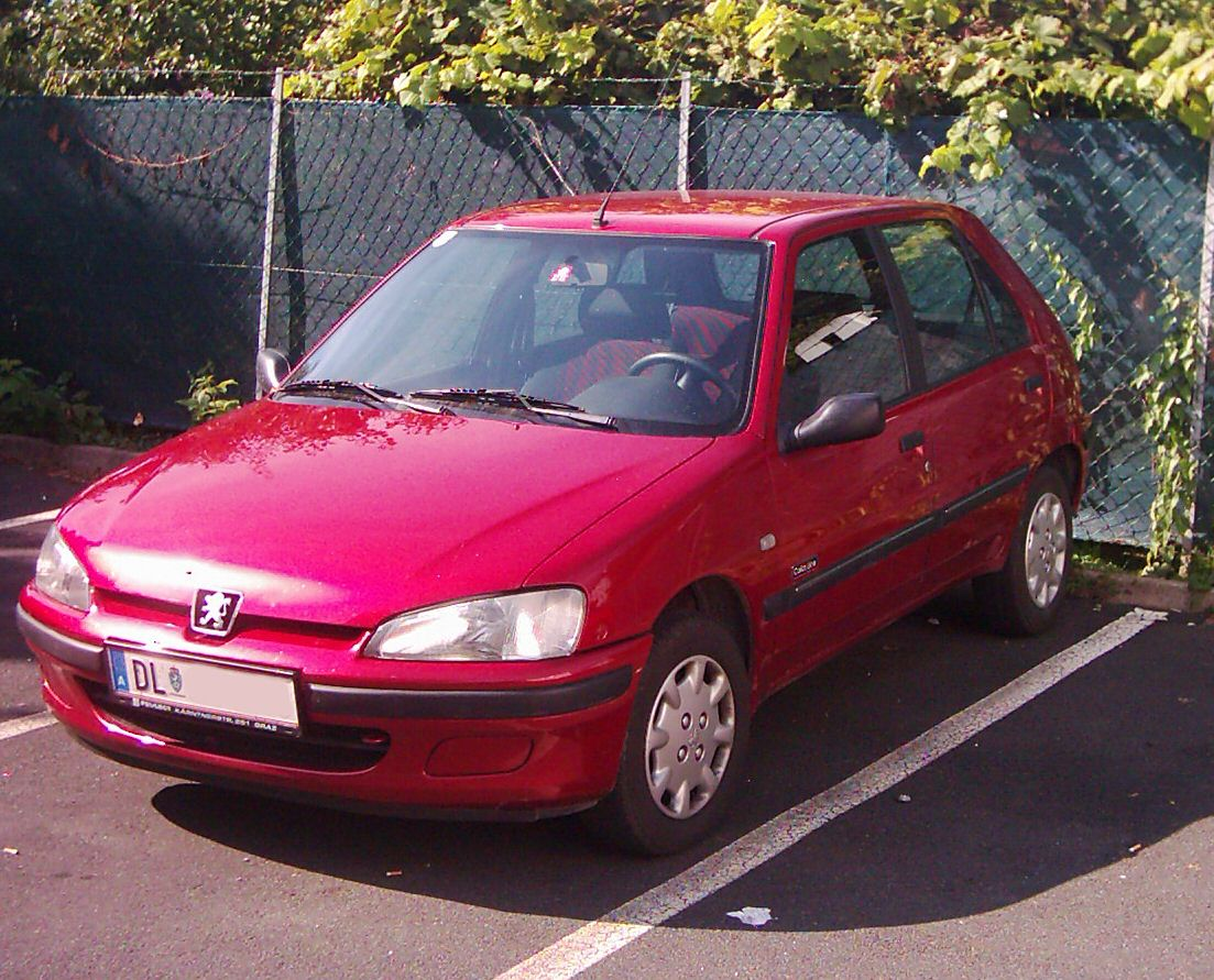 A 1999 Peugeot 106 diesel Description in de wikipedia Peugeot 106 (Dieselversion) Bj. 1999, eigenes Auto+Foto